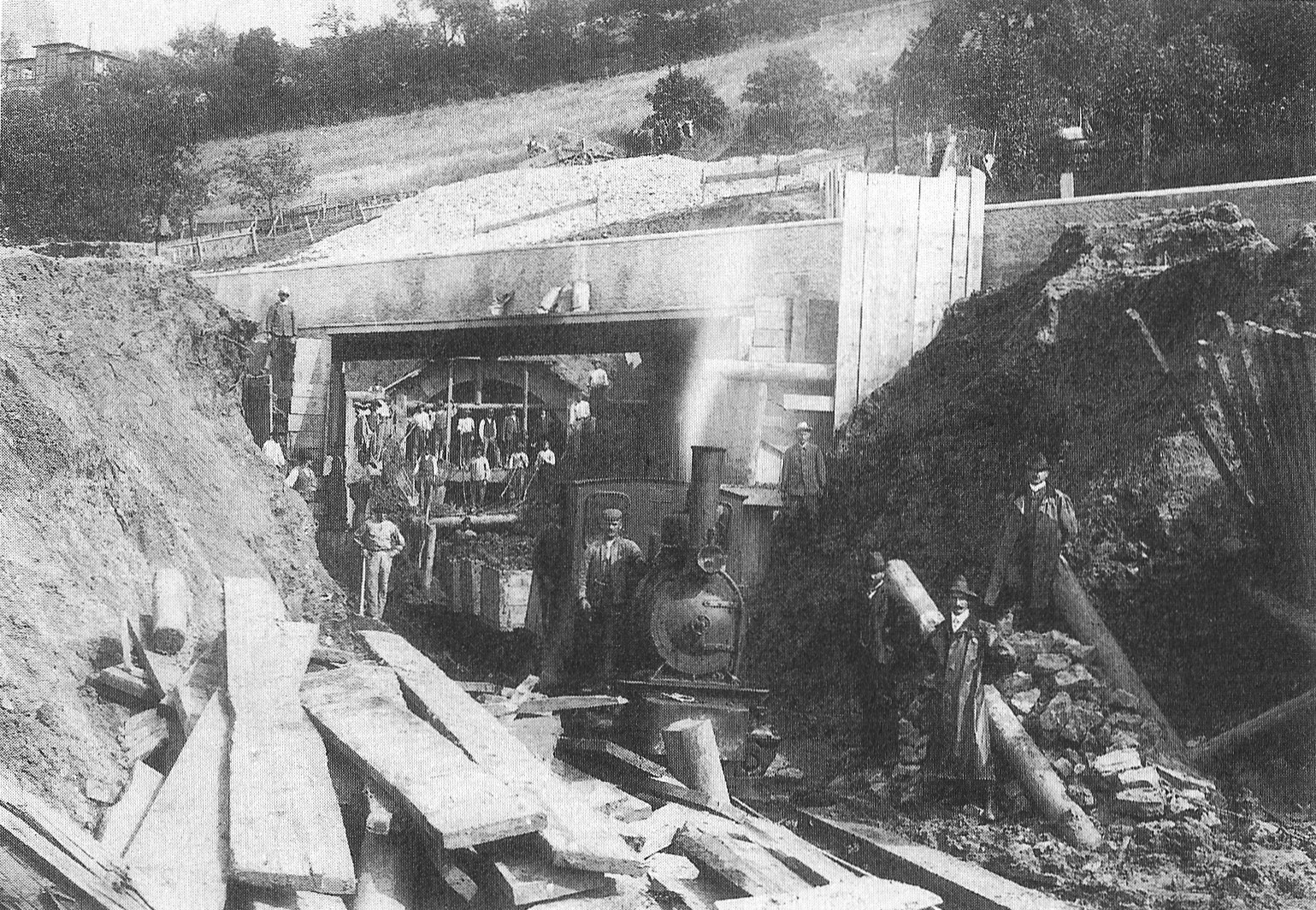 Tübingen. Bau des Ammertalbahn-Schlossbergtunnels. Bemerkenswert ist, dass über dem Nordportal ein Aquädukt für den Ammerkanal gebaut werden musste.